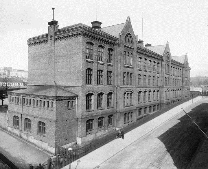 Foss skole på Grünerløkka, Oslo, ca 1910